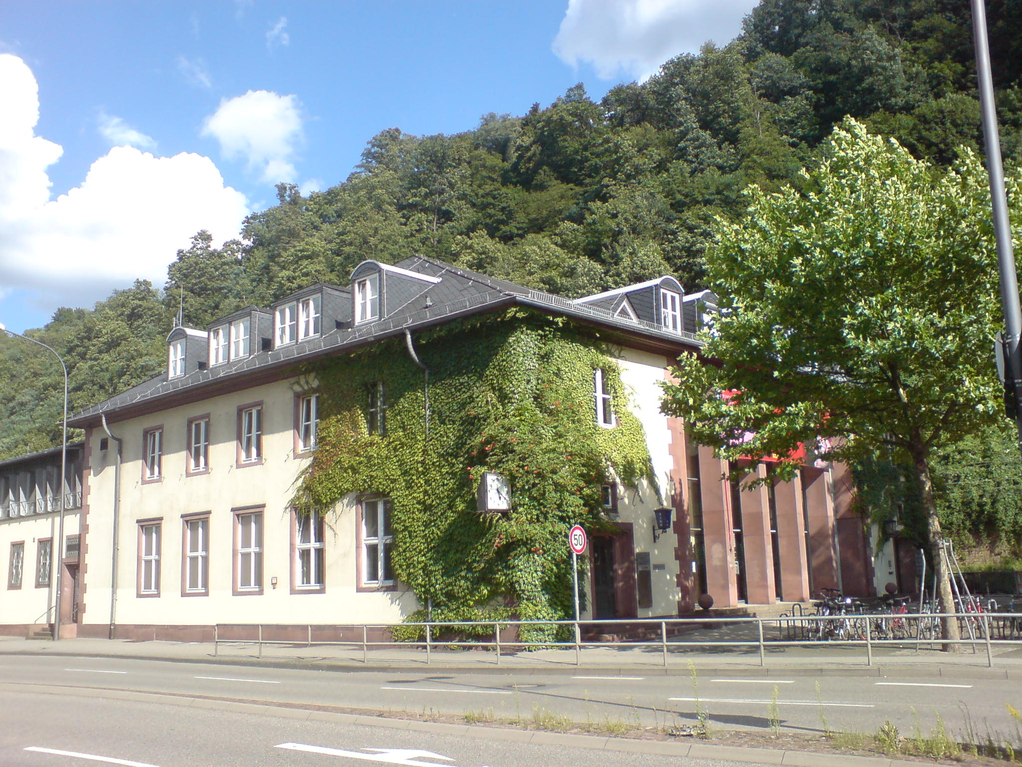 Karlstorbahnhof in Heidelberg/Germany